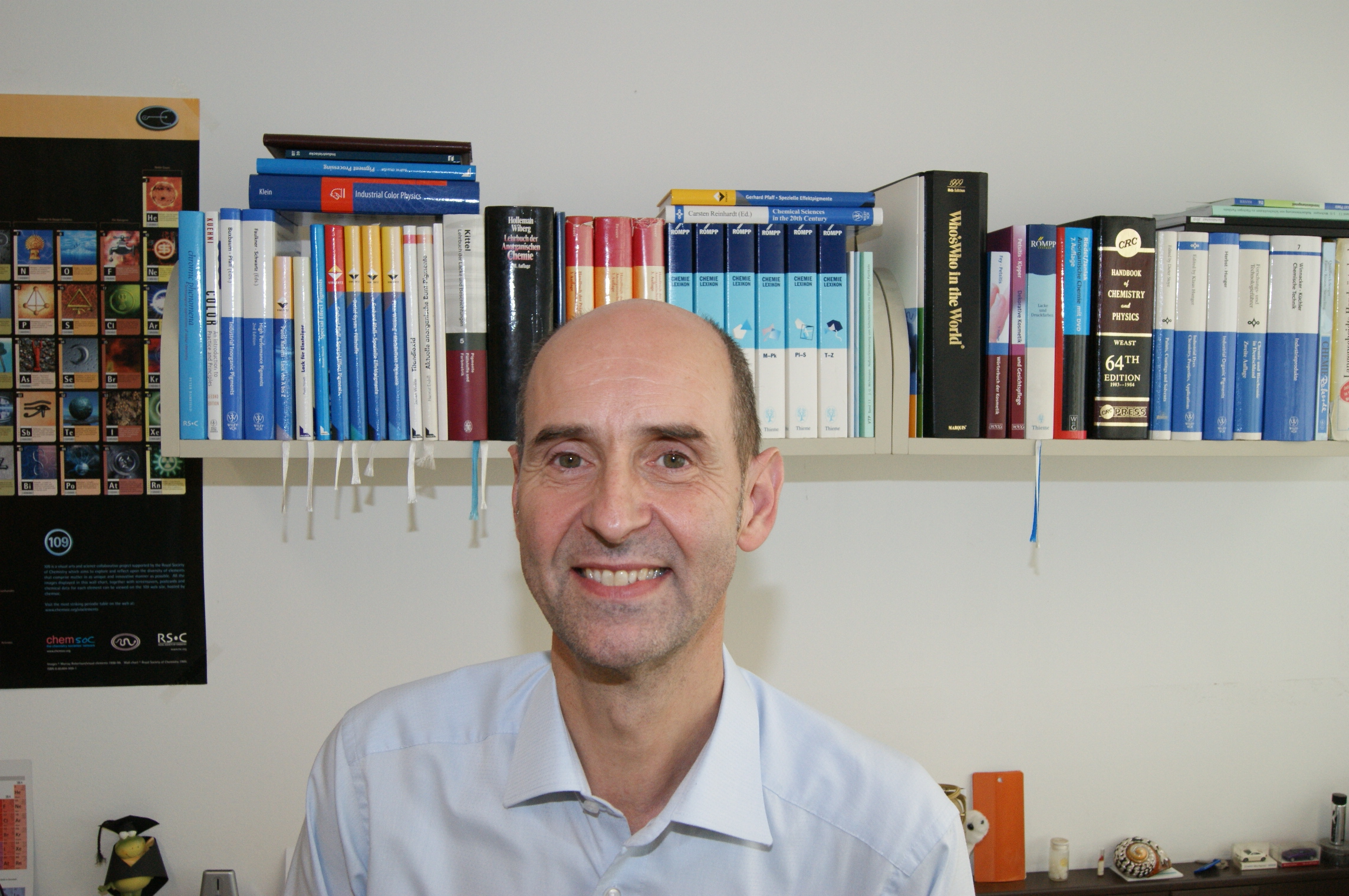 Gerhard Pfaff